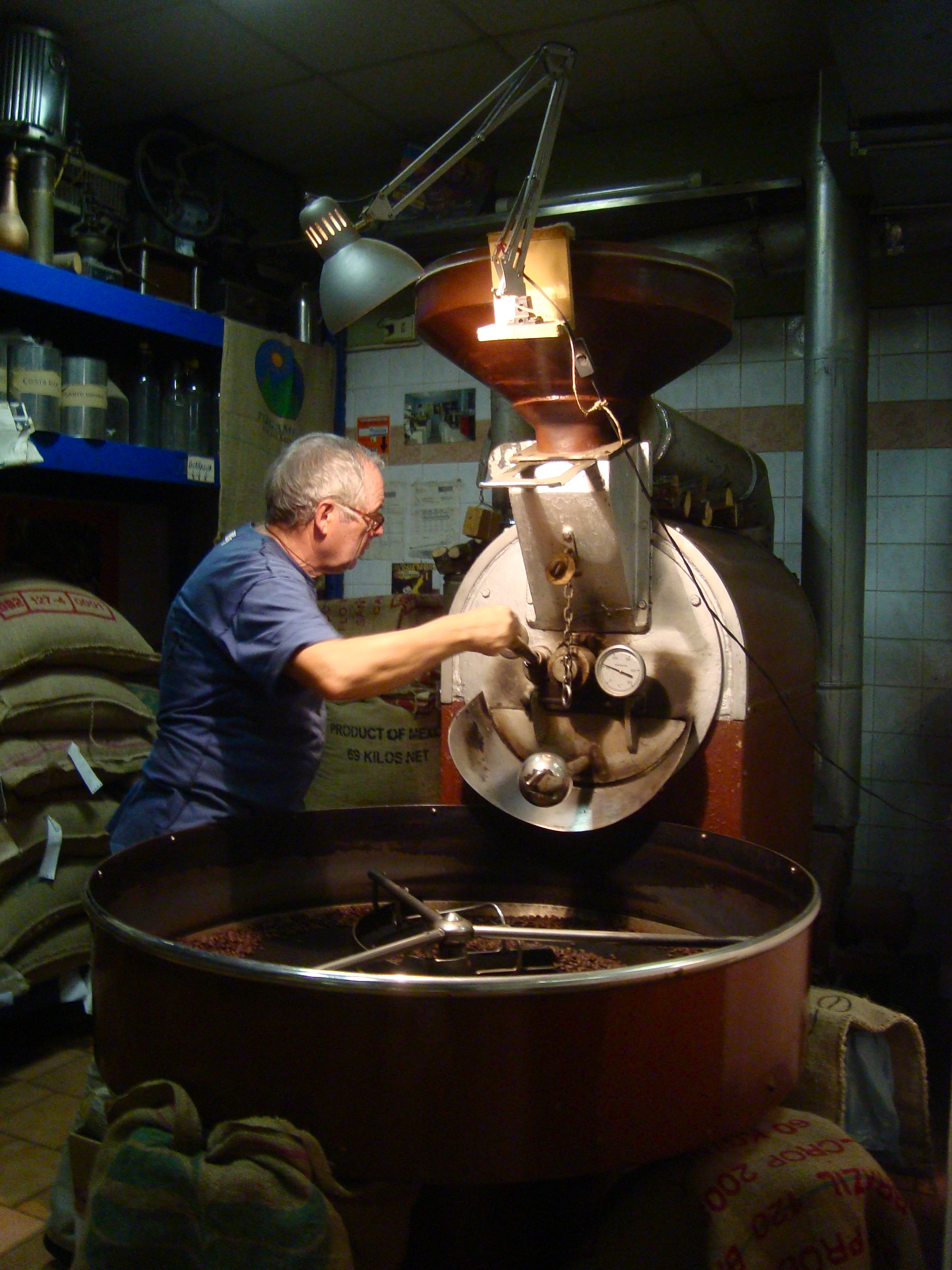 La torréfaction au Caffè Sant'Eustachio de Rome dans un torréfacteur datant de 1948 et utilisant le bois.